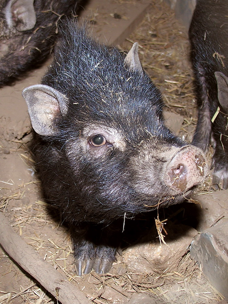 Letreiro Cans non.